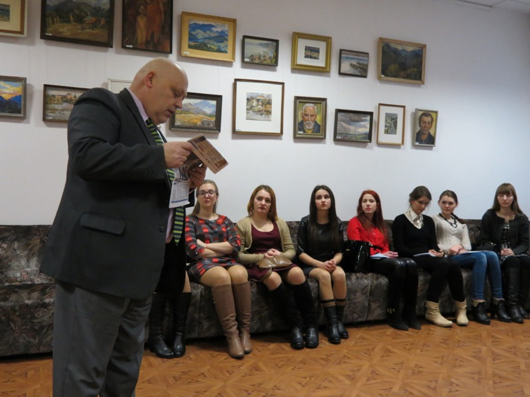 Майстер-клас від Віталія Цезарійовича Міхалевського